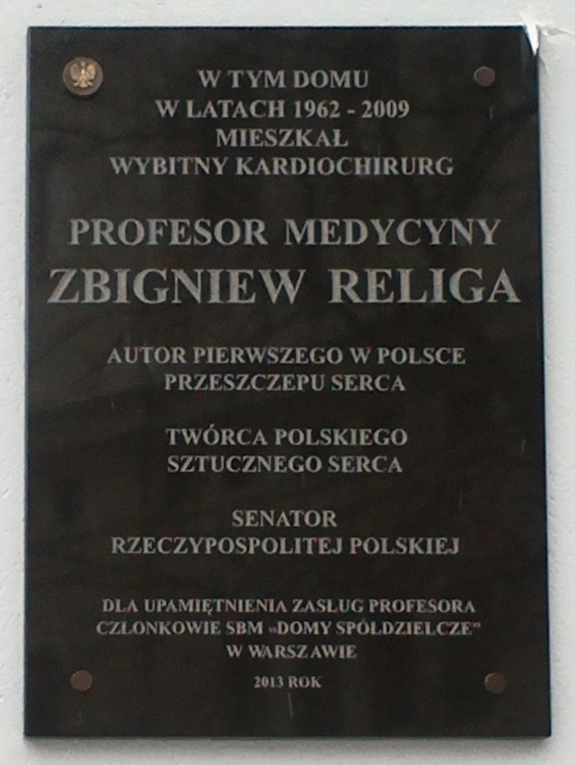 Tablica poświęcona Zbigniewowi Relidze odsłonięta na ścianie domu przy Alei 3 Maja 2 w Warszawie 7 marca 2013 roku